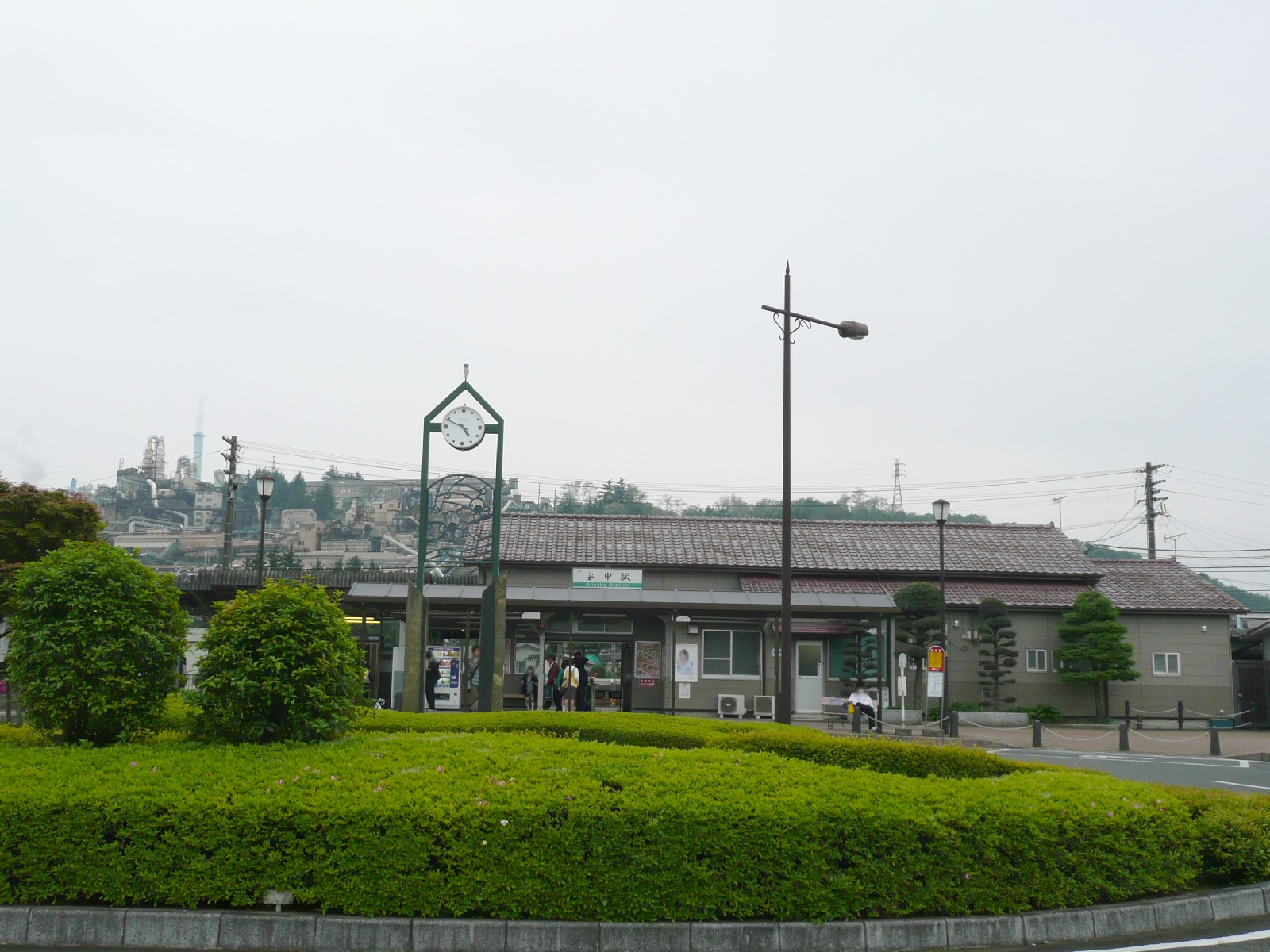 安中駅